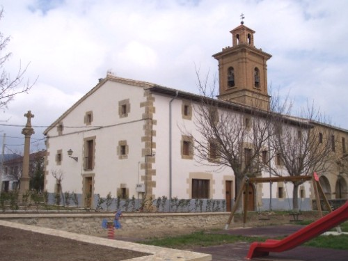 Adios